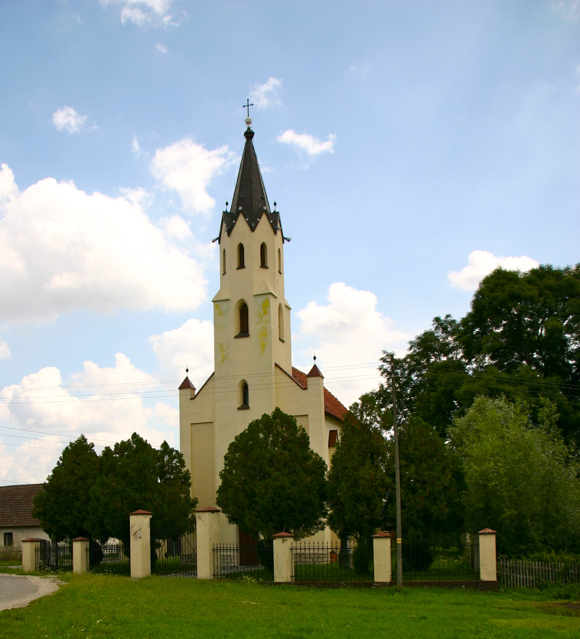 Mokra (dodatkowa nazwa w j. niem. Mokrau) – wieś w Polsce położona w województwie opolskim, w powiecie prudnickim, w gminie Biała.